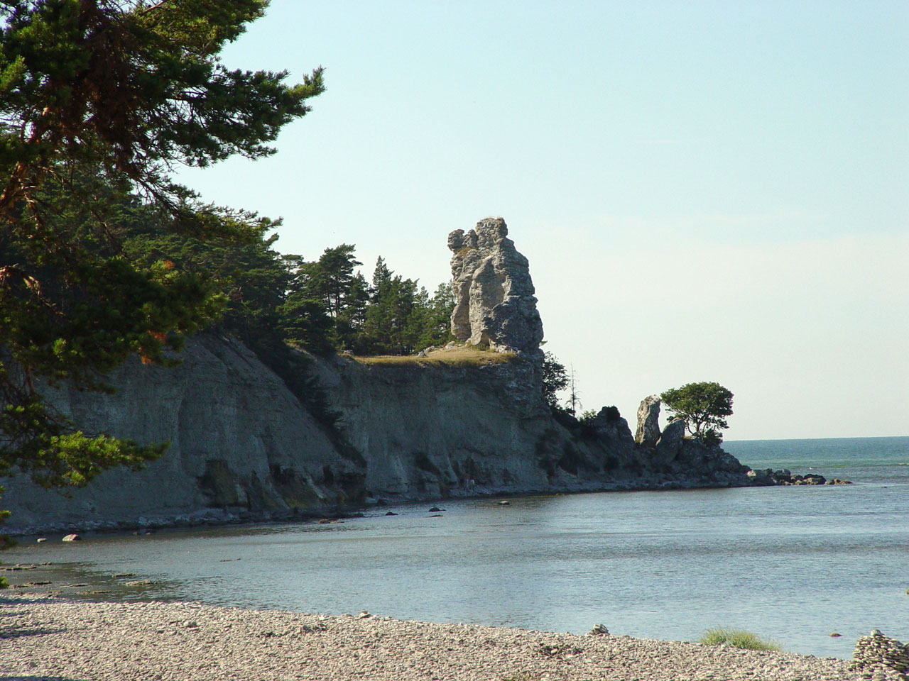 Rauk Jungfru auf Gotland (bei Lickershamn). Der grösste Rauk auf Gotland ist ca. 12m hoch und steht auf einem Plateau 20m über NN